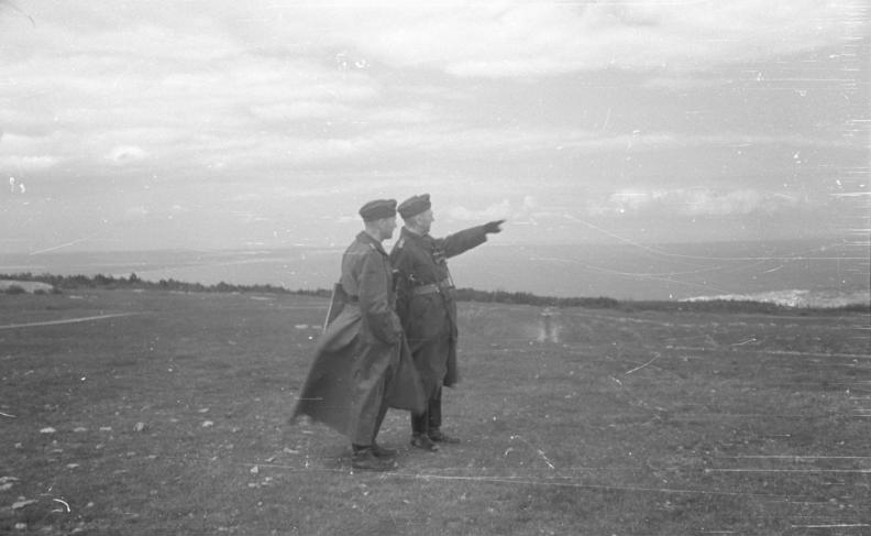 Über dem Hafen Feodosija